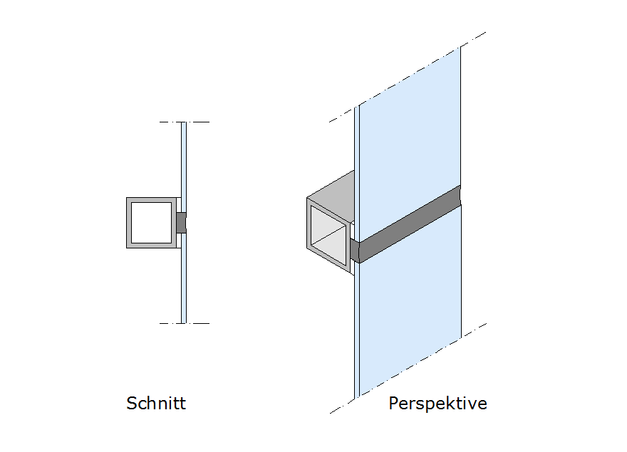 Diese Grafik zeigt einen Schnitt durch eine Verklebung bei SG-Fassaden